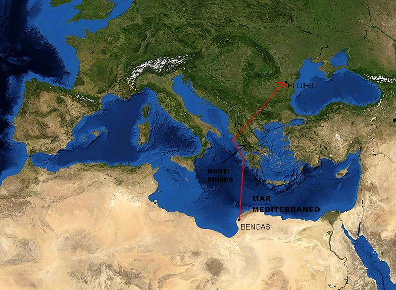 Mappa Mediterraneo